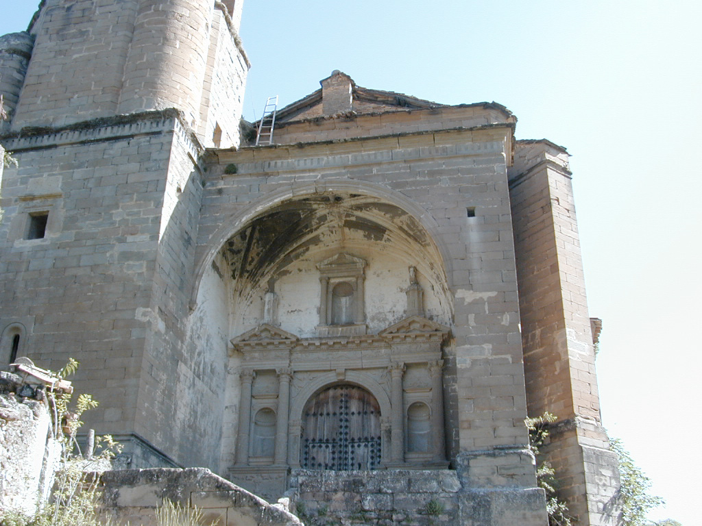 Portada de la Iglesia de Olsón